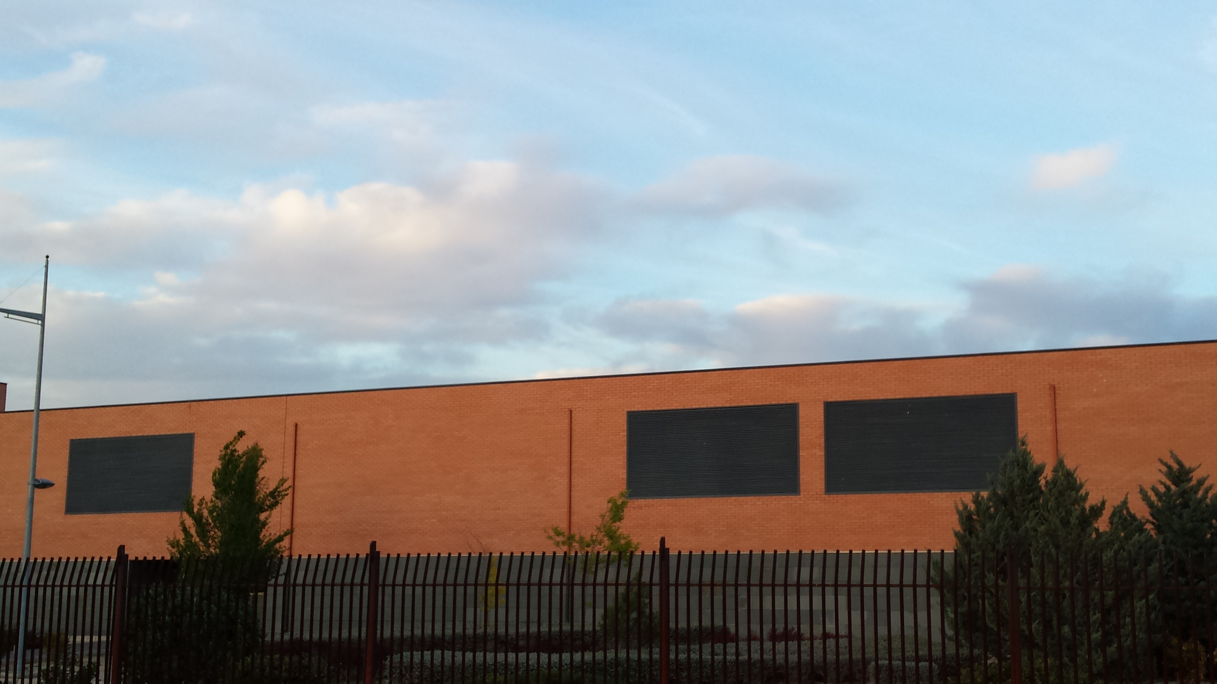 Animalario Albacete